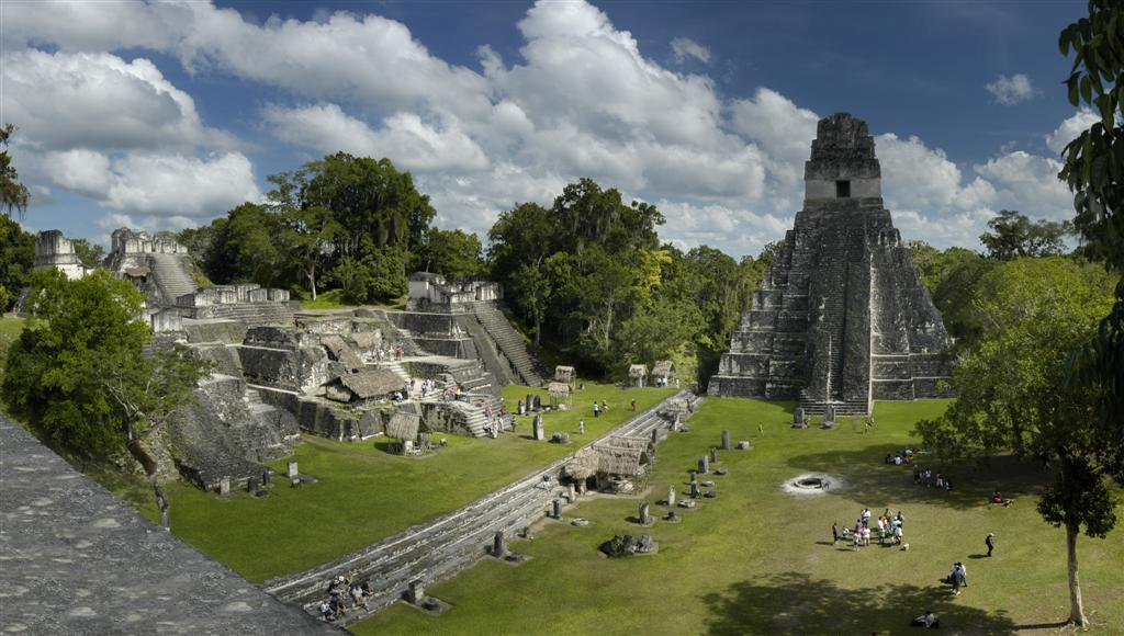 Tikalas